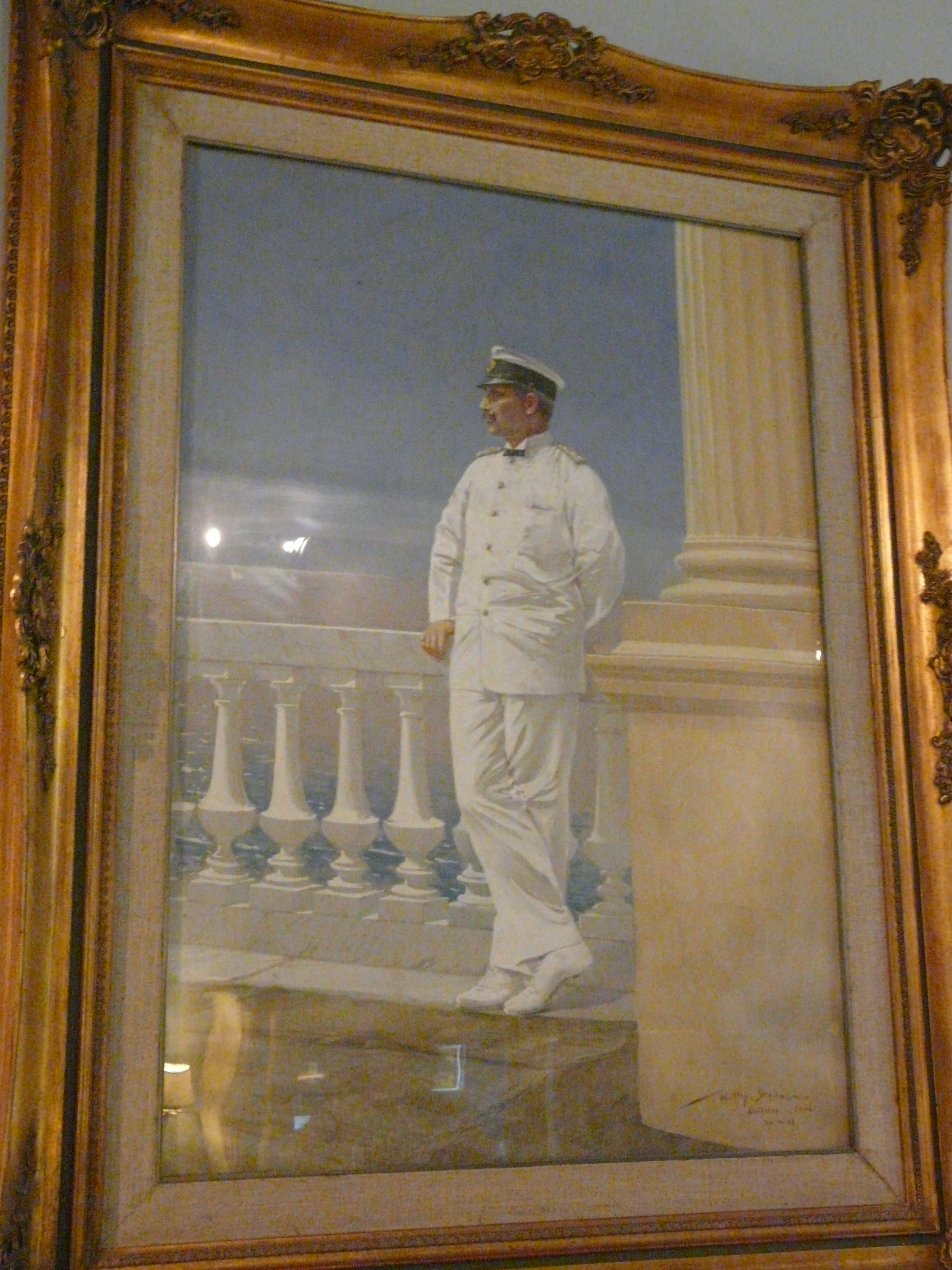 Achilleion